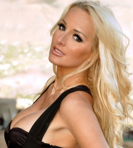 Foto på Marie Plosjö